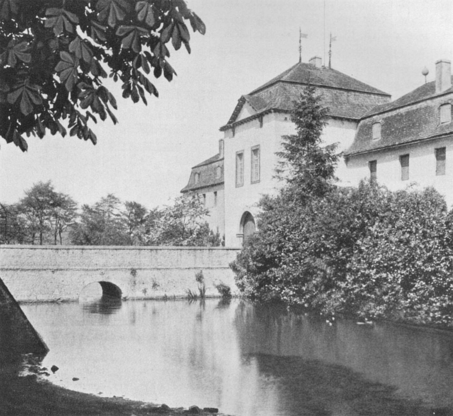 Der Torbau der Burg Frenz